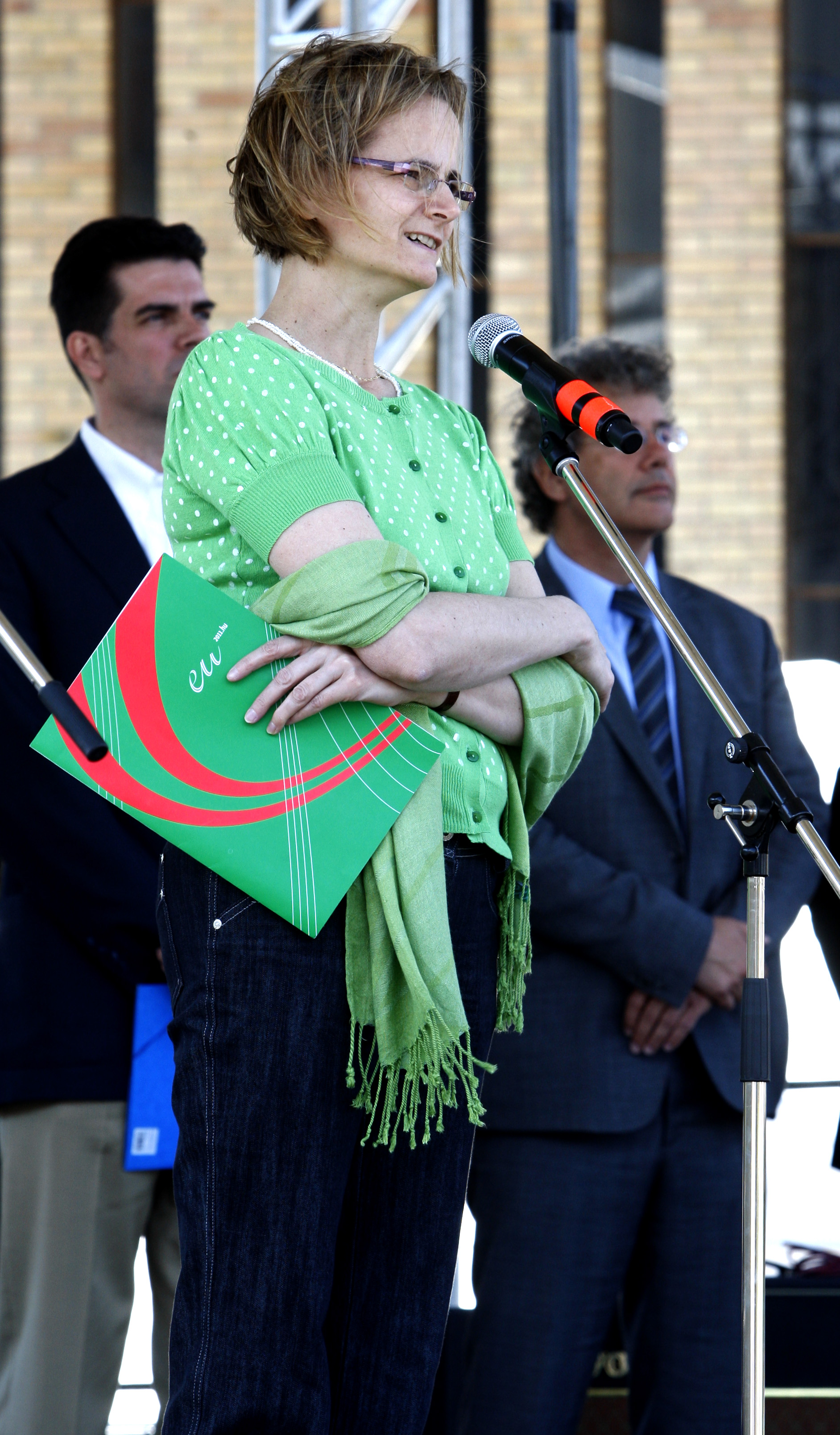 A magyarországi EU-intézmények az Európa-nap alkalmából az idén kétnapos fesztivállal várják a családokat a május 7-8-i hétvégén a Millenárison. Az egész napos gyermek- és családi programok, színielőadások és koncertek - például a Budapest Bár produkciója - mellett a fesztiválon bemutatkoznak az európai tájékoztató szolgálatok, és különleges hangsúlyt kapnak az olyan témák mint az önkéntesség, a fiatalok mobilitása, a soknyelvűség, a klímaváltozás és a diszkrimináció elleni küzdelem. Győri Enikő államtitkár.